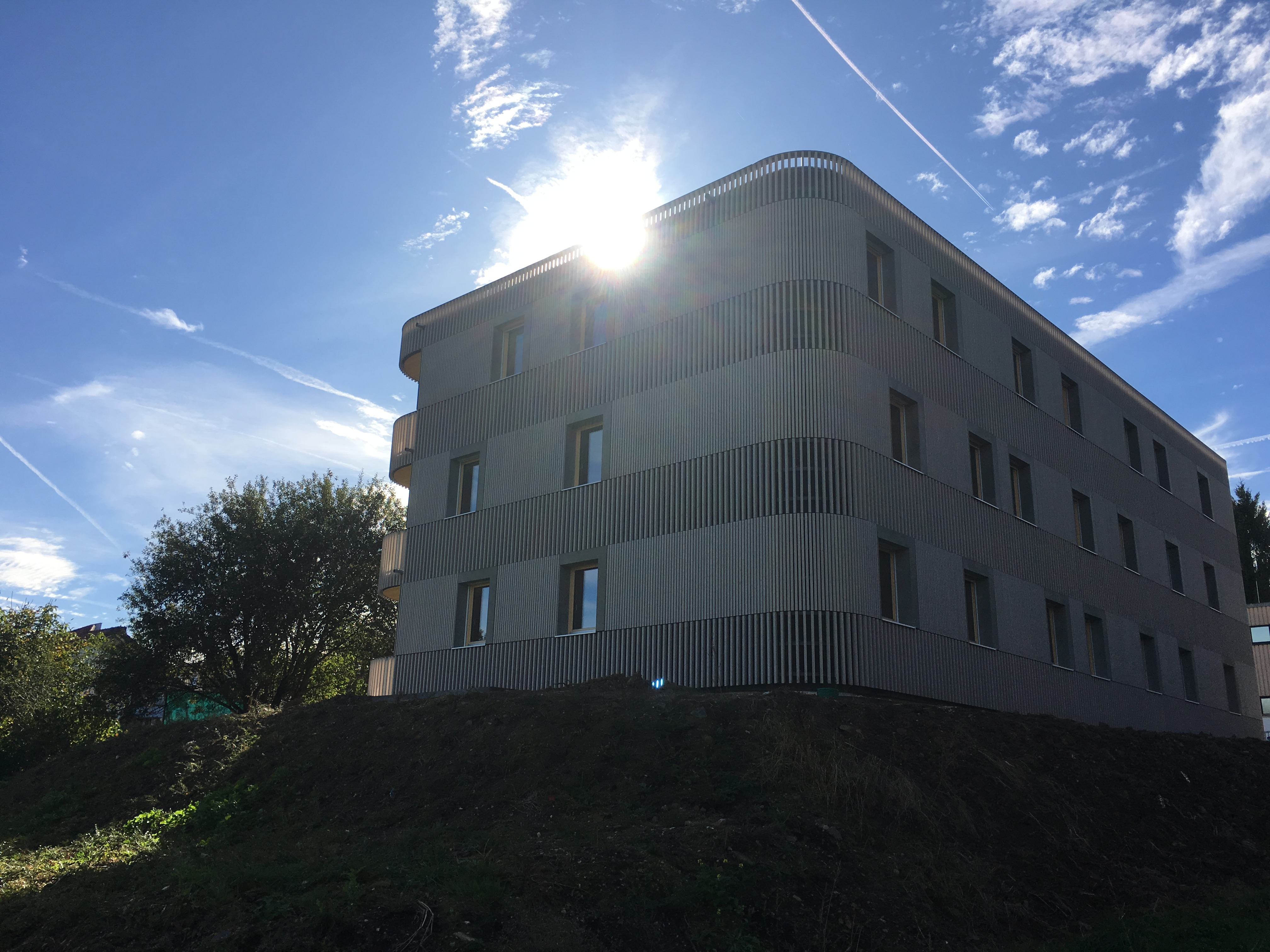 Hoffnungshaus von Hoffnungsträger, Außenansicht hinten